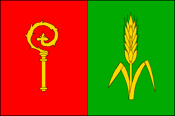 vlajka, Horní Rožínka, okres Žďár nad Sázavou